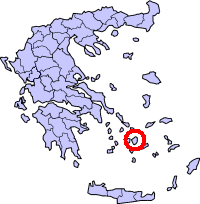 纳克索斯岛在希腊的位置。